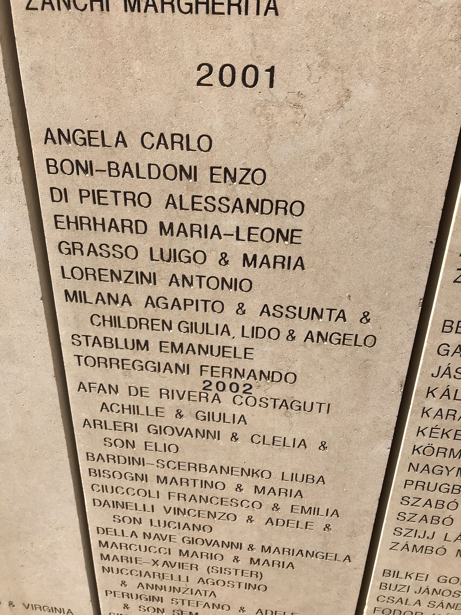 קרלו אנגל'ה על לוח הזיכרון בגן "חסידי אומות העולם" ביד ושם